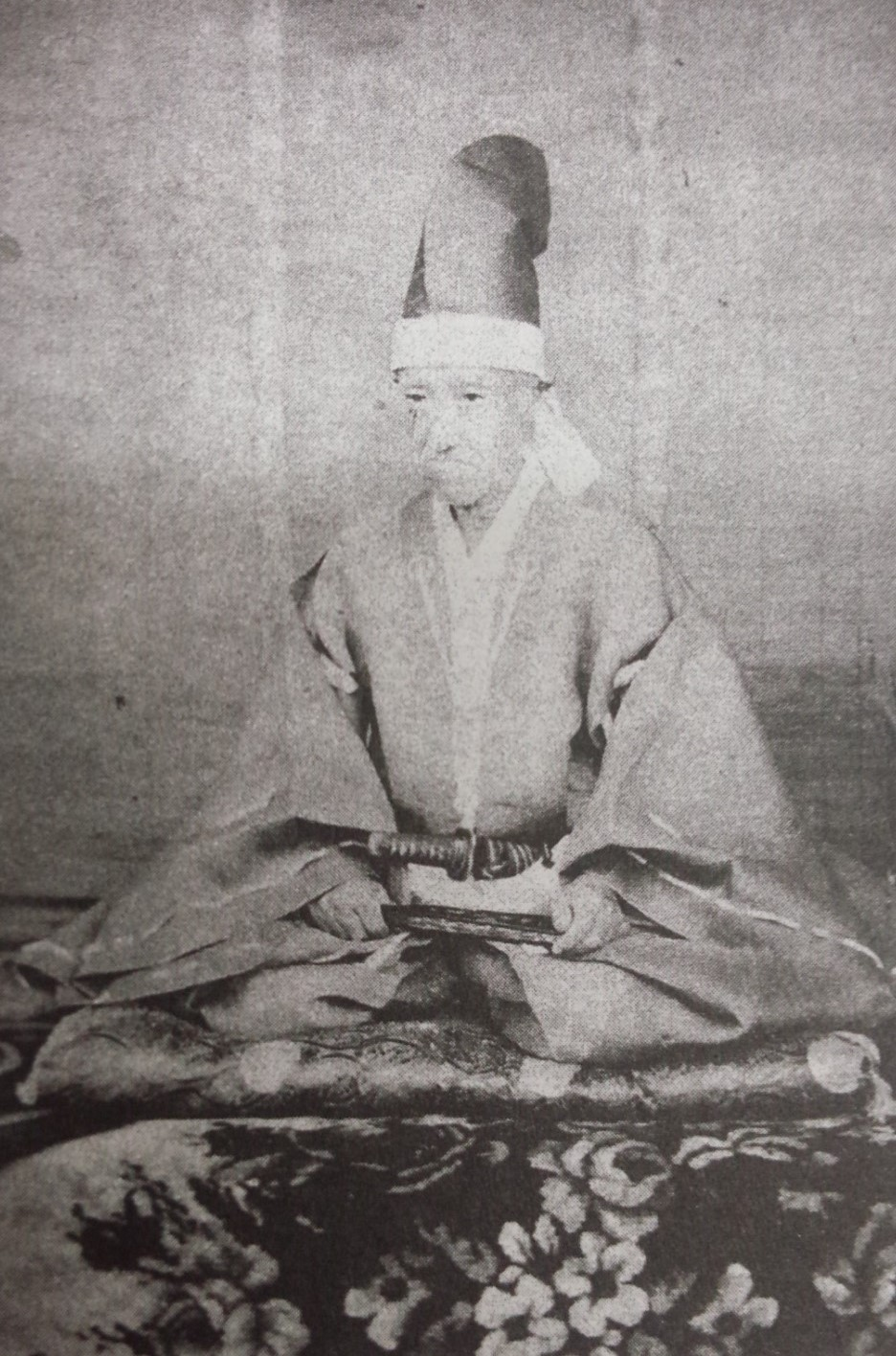 岩倉具慶の肖像写真。